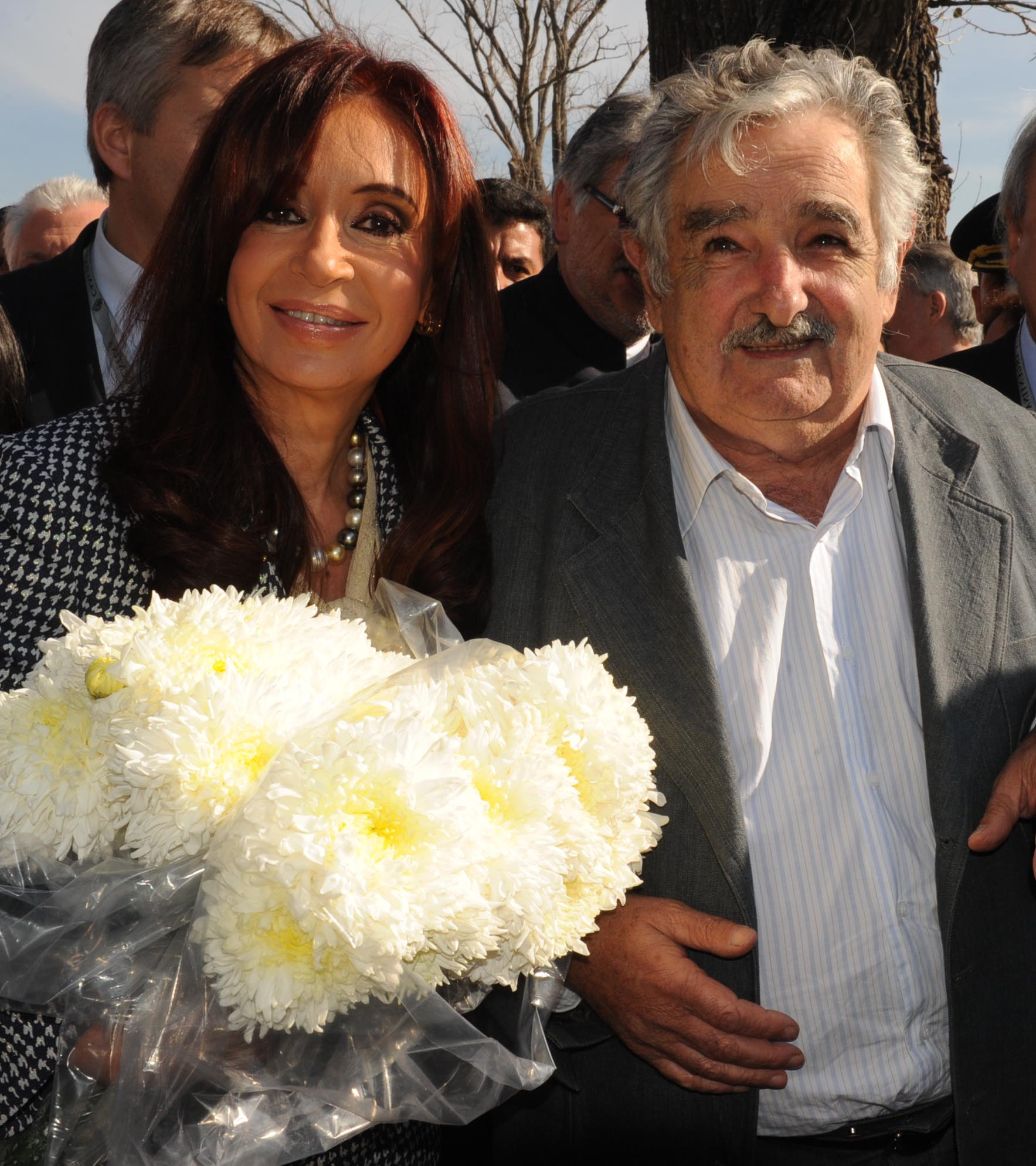 La presidenta Cristina Fernández junto a su par de Uruguay, José Mujica, en la cumbre de Unasur